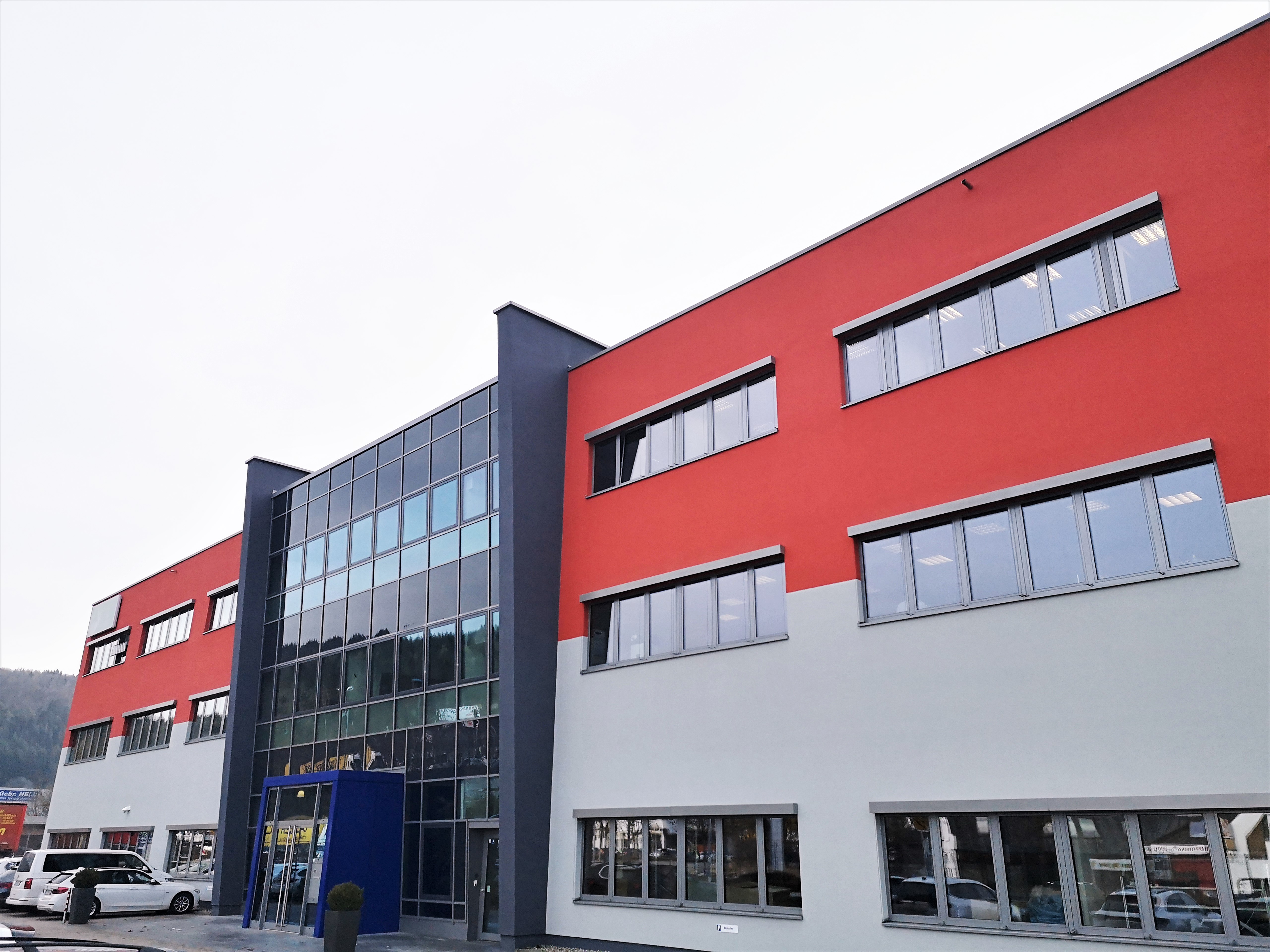 Das Bild zeigt den Hauptsitz von Henke-Sass, Wolf in der Keltenstraße in Tuttlingen.